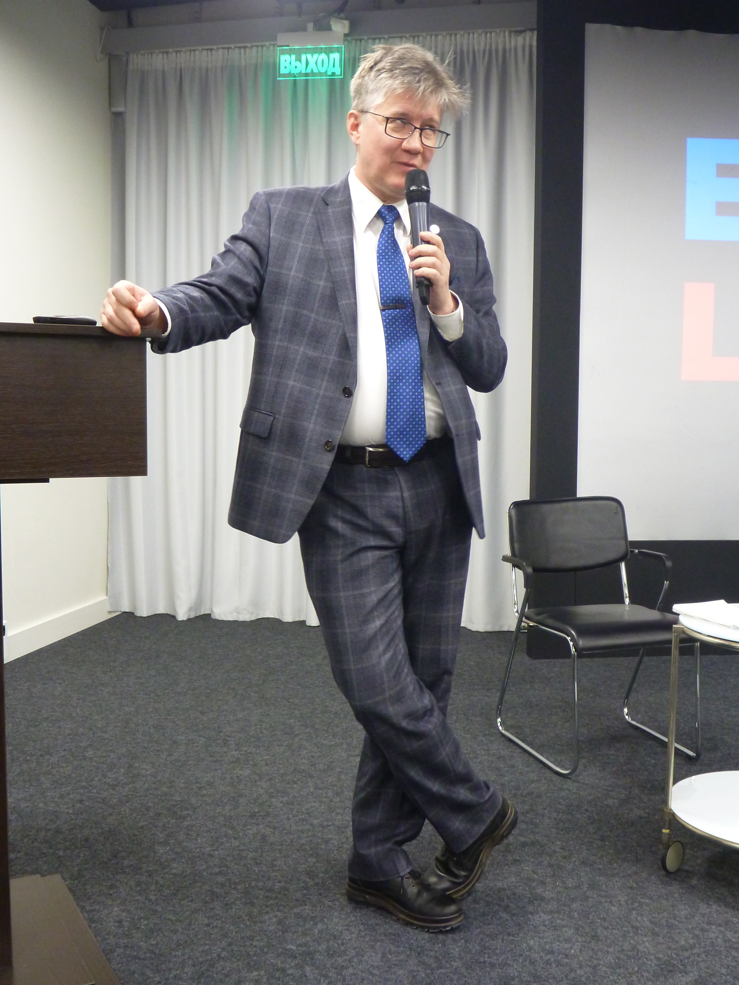 Иван Курилла в Ельцин-центре в полный рост 7 февраля 2020 года